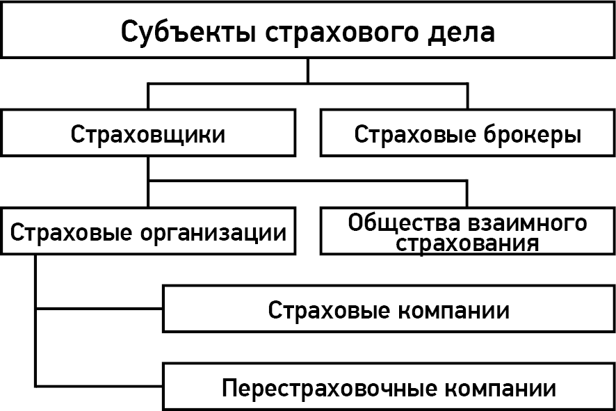 Новая иерархическая диаграмма субъектов страхового дела